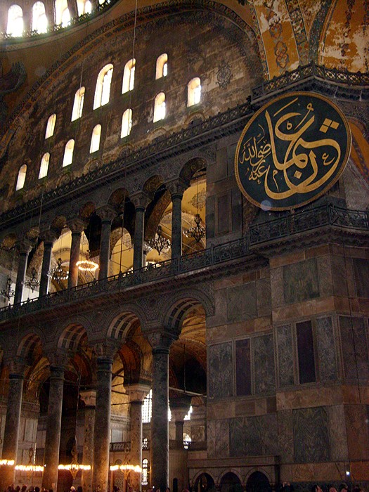 Istanbul - Interno della Basilica di S. Sofia